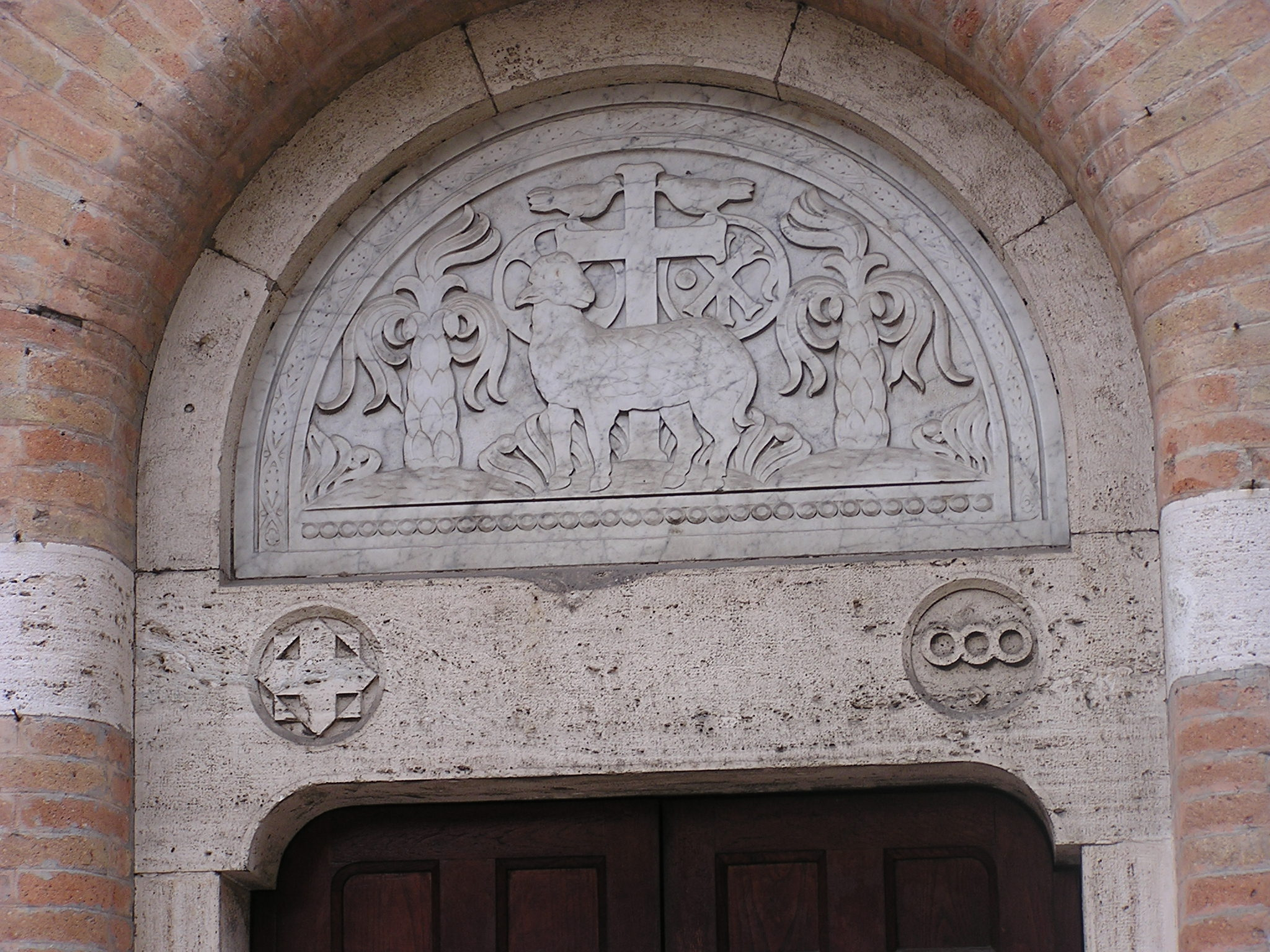 Scultura di Vittorio Merelli nella Chiesa della Sacra Famiglia